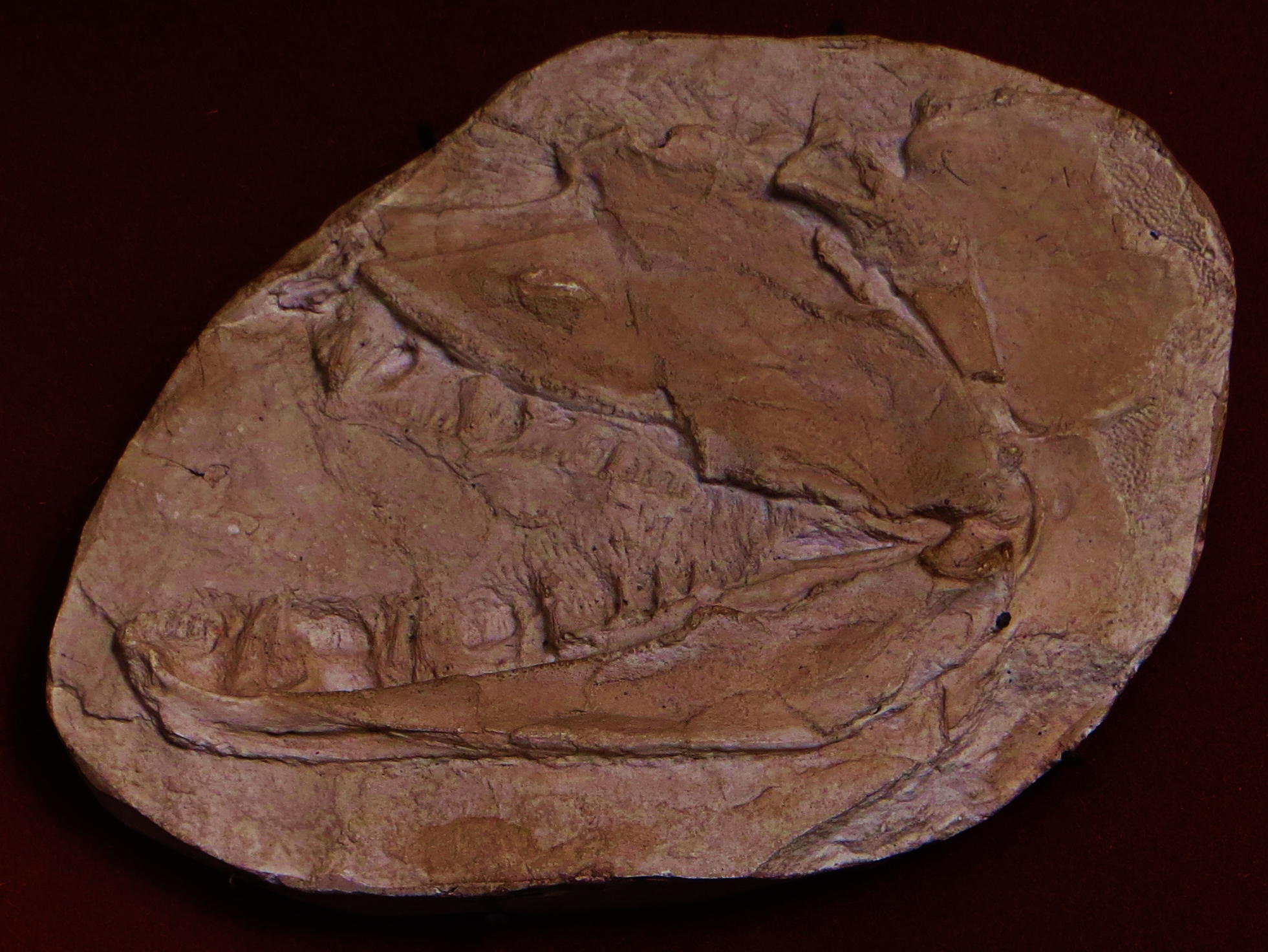 Fossil of Eusthenopteron, an extinct fish- Took the photo at Musee d'Histoire Naturelle, Paris